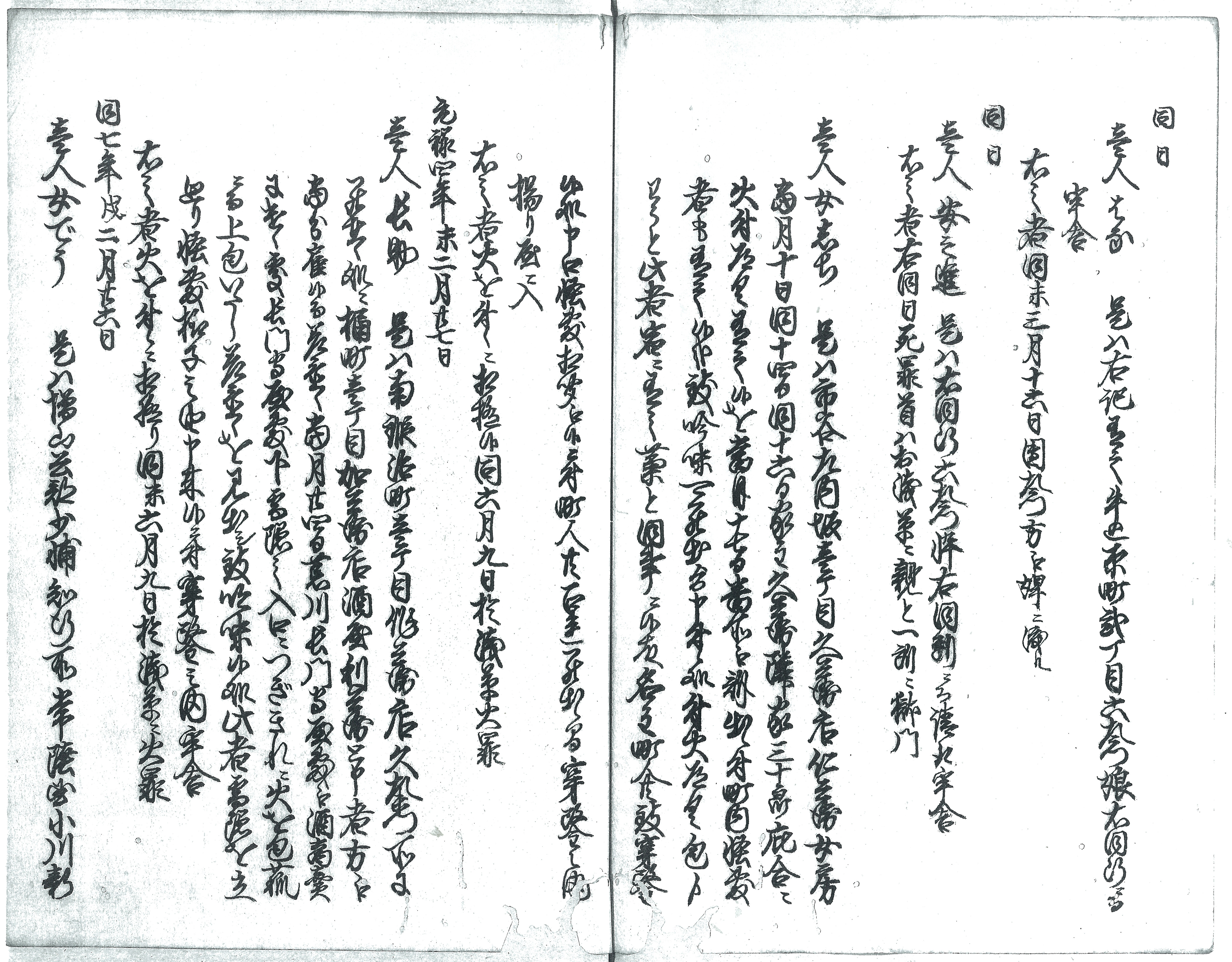 御仕置裁許帳 巻六火を付る者之類丼投火仕者之類